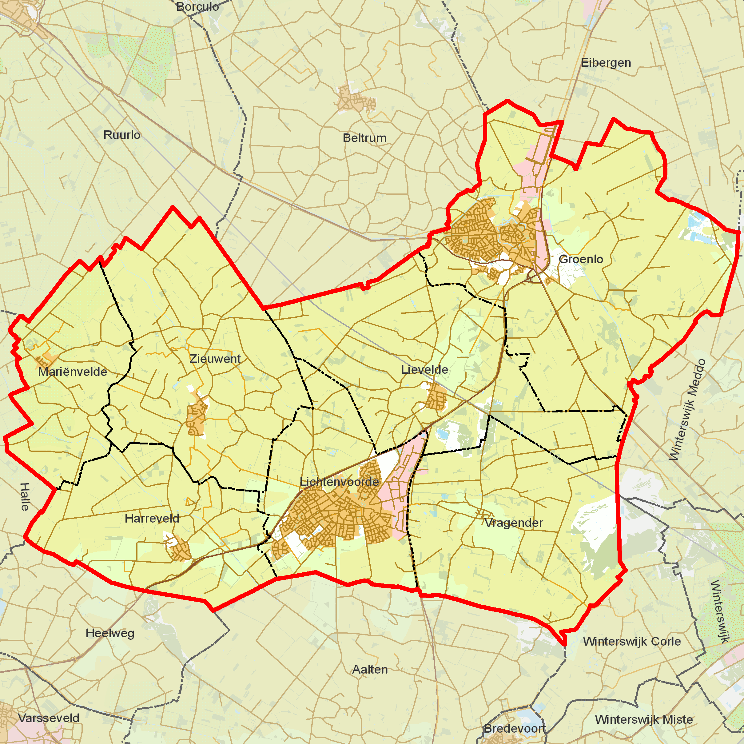 BAG woonplaatsen - Gemeente Oost Gelre.png